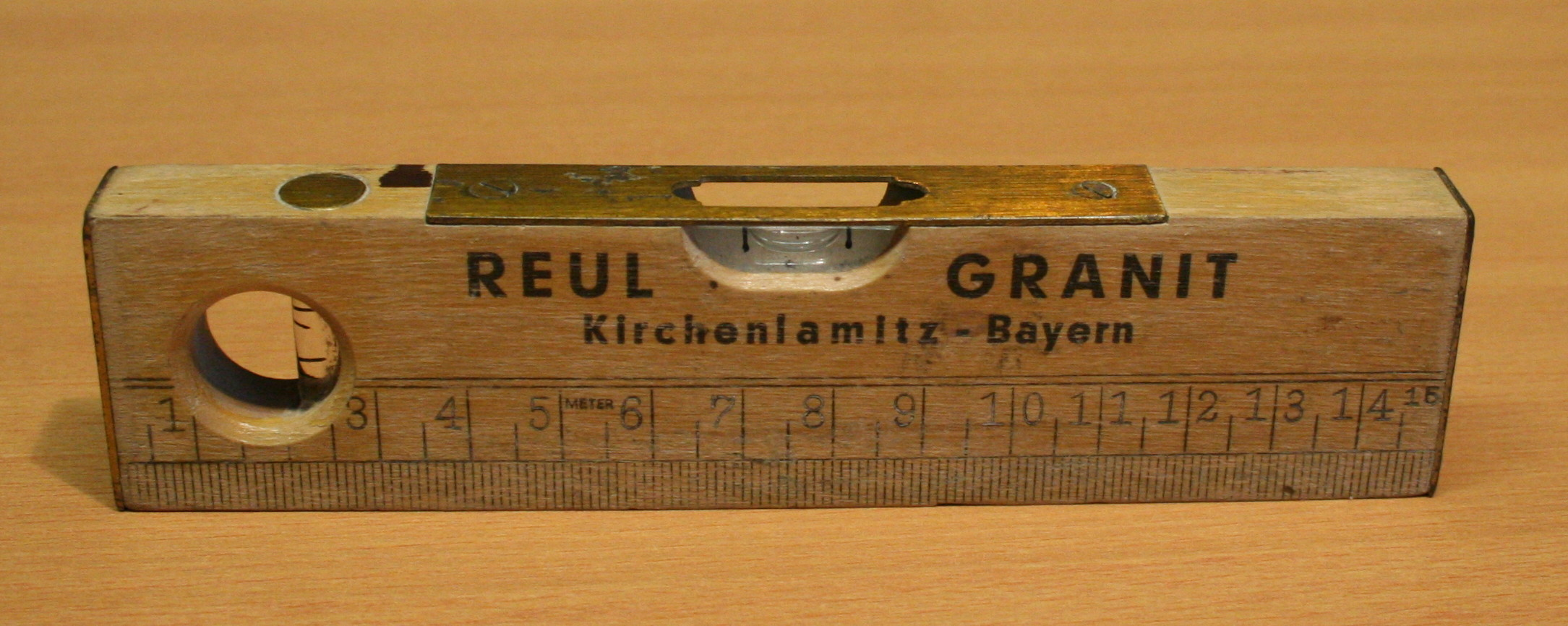 Werbungsmaßnahme der früheren Reul-AG